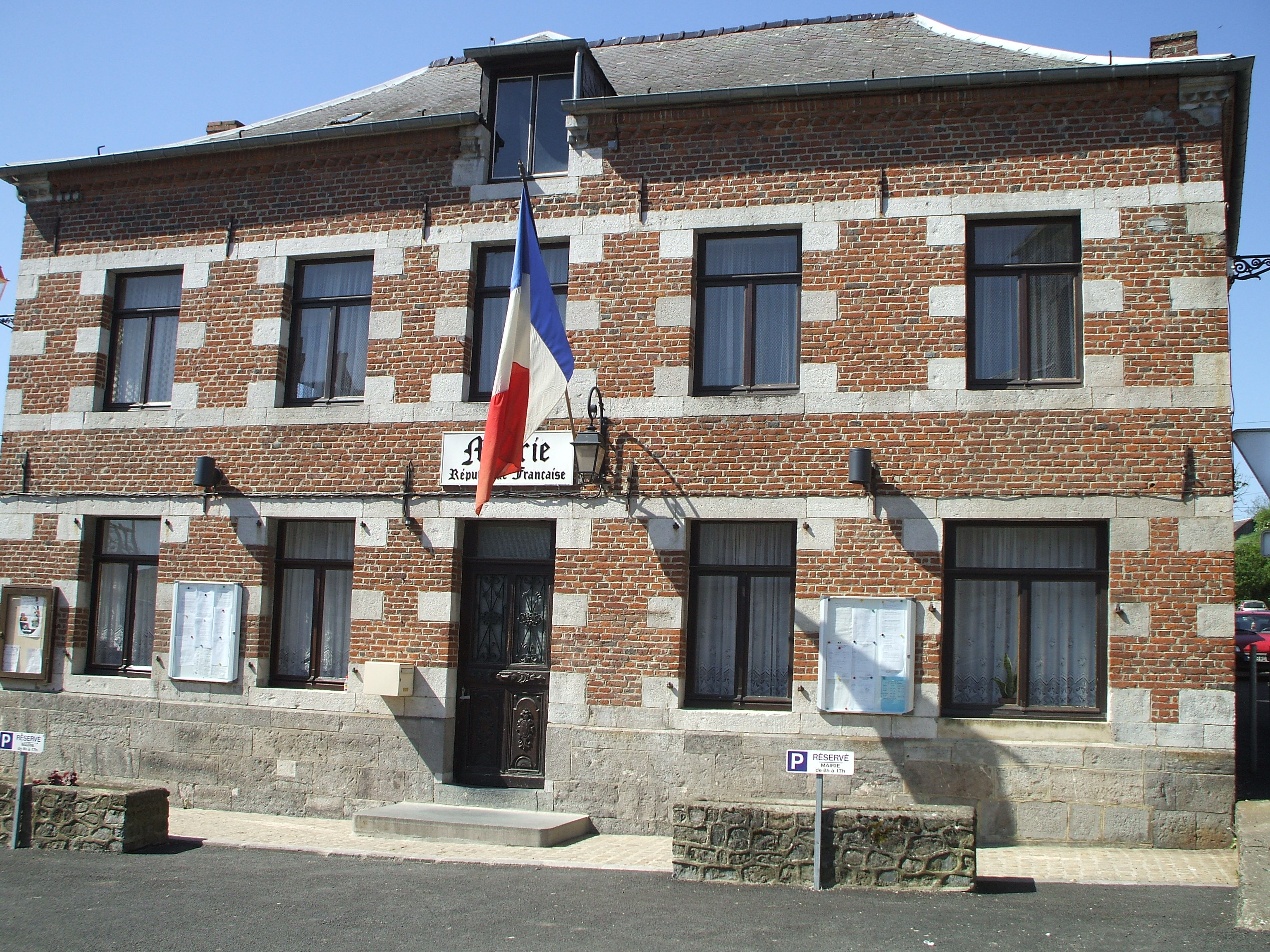 Mairie de Dompierre-sur-Helpe Nord france